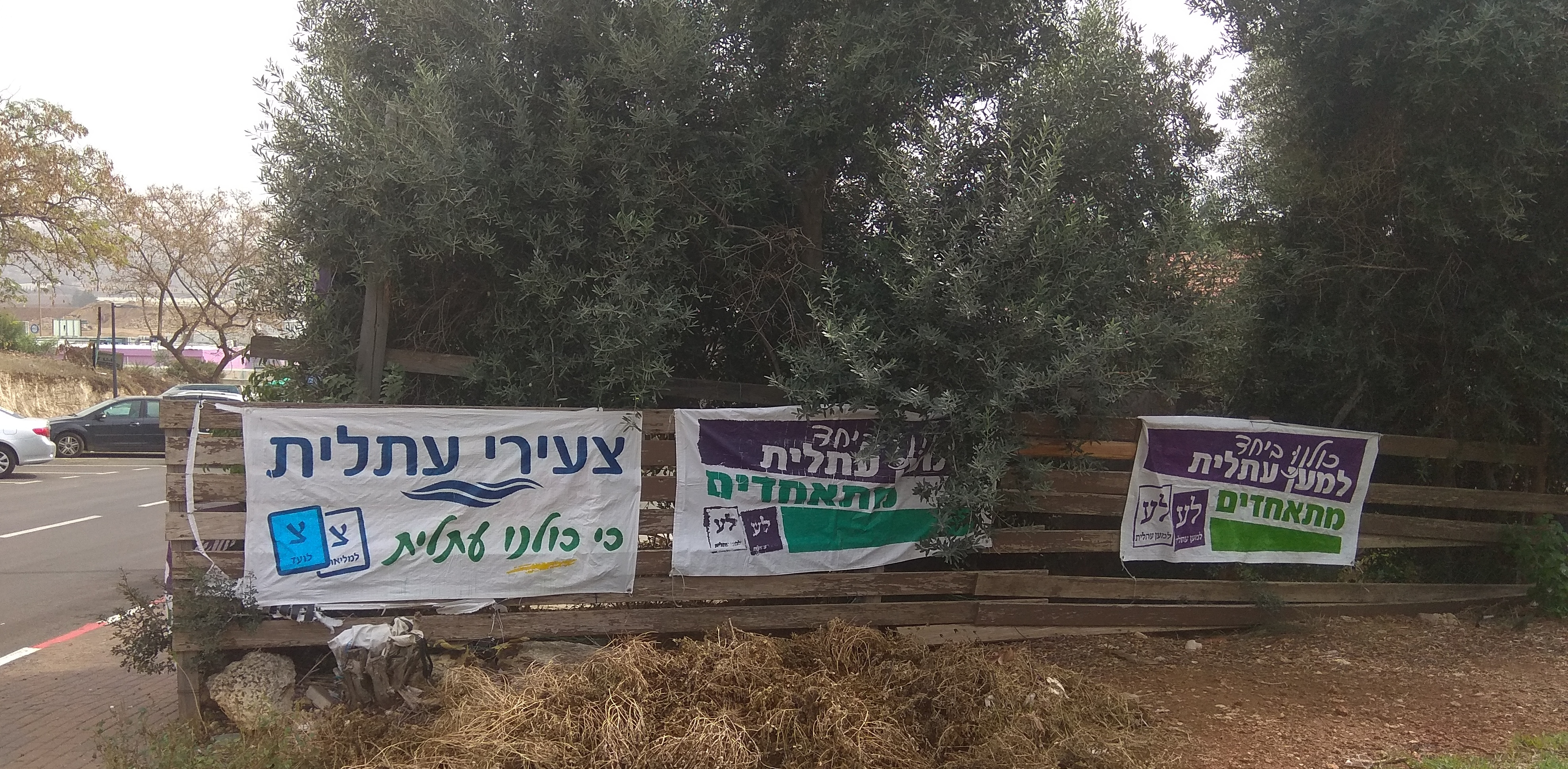 שלטי בחירות לוועד המקומי ולמליאת המועצה בעתלית